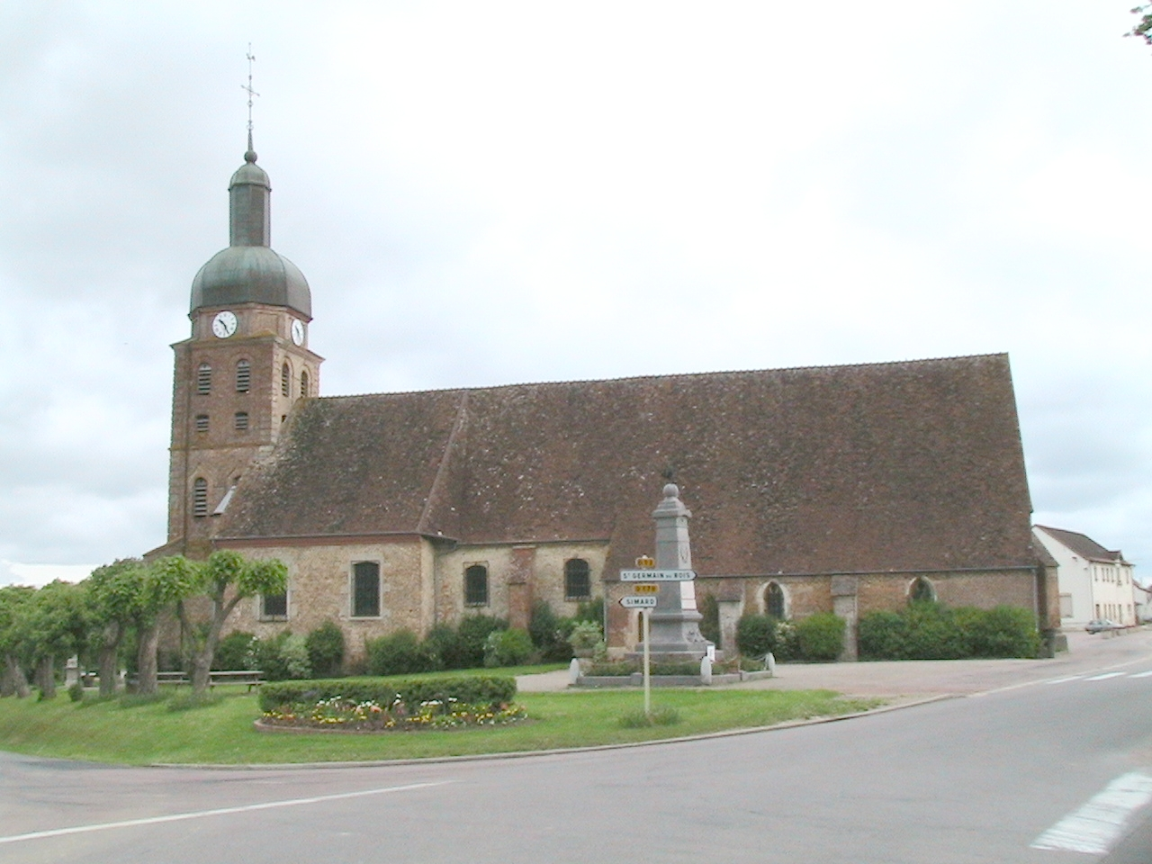 Photo prise le 28 mai 2006. Église de Saint-Usuge